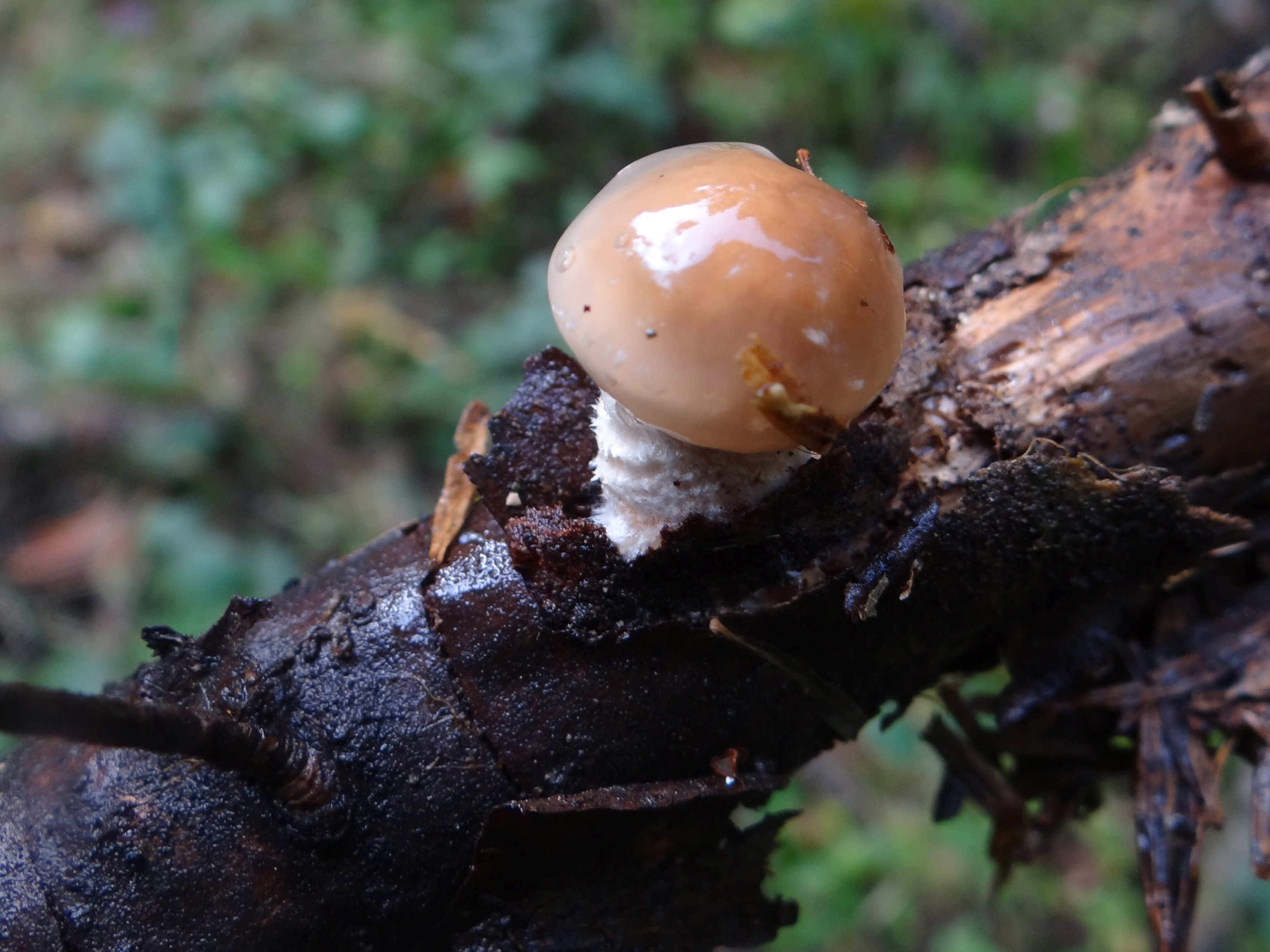 Pholiota lenta (location: Poland, Beskid Wyspowy, Kobyła)